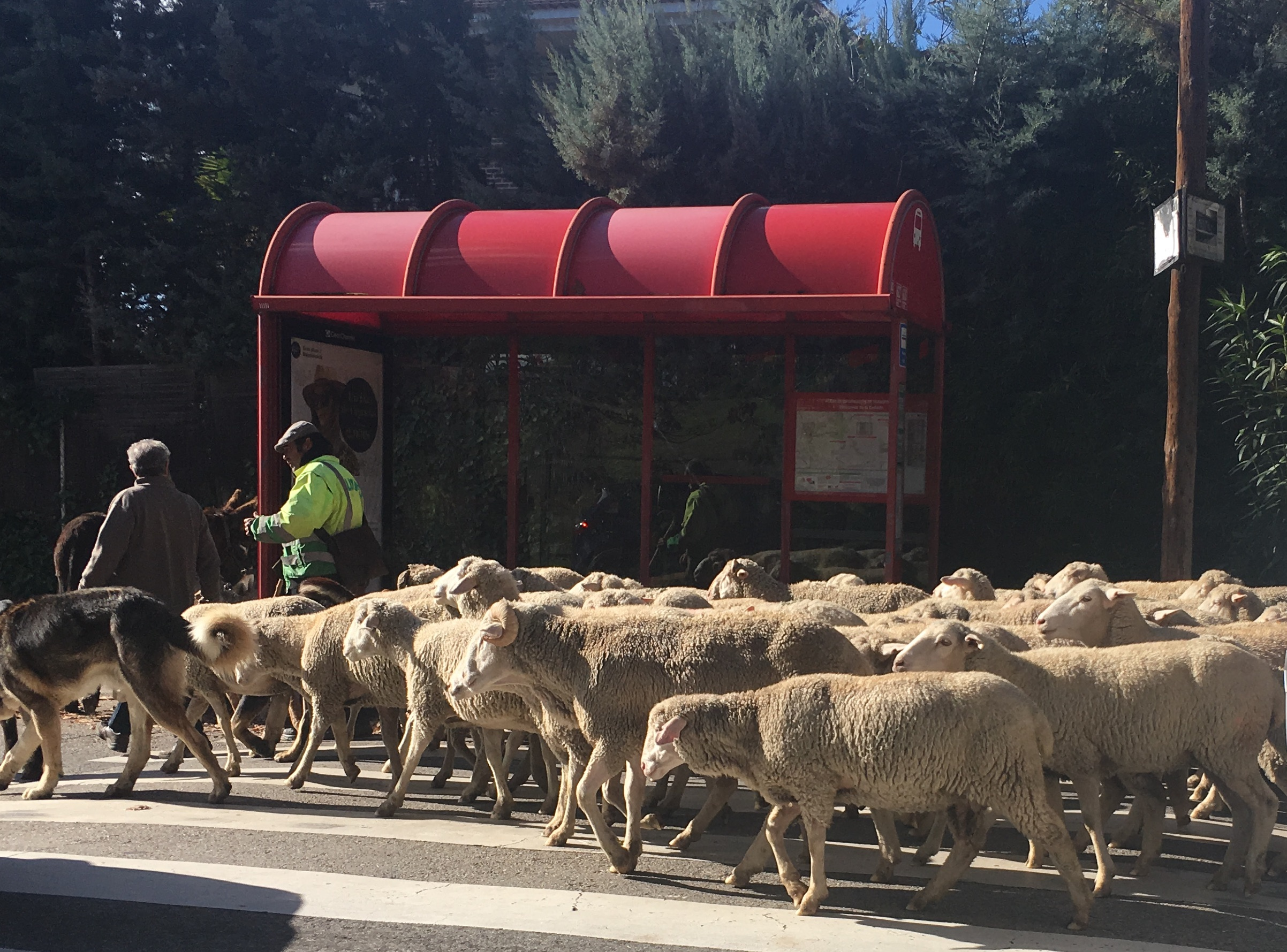 Ovejas enVillafranca del Castillo (Madrid).